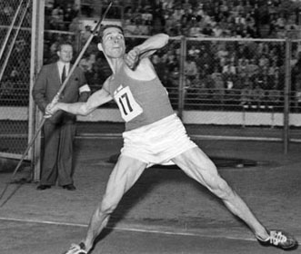 Soini Nikkinen